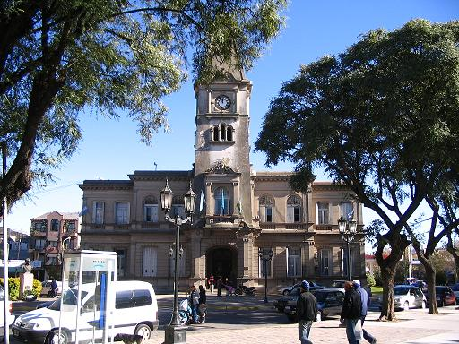 Municipalidad de Campana